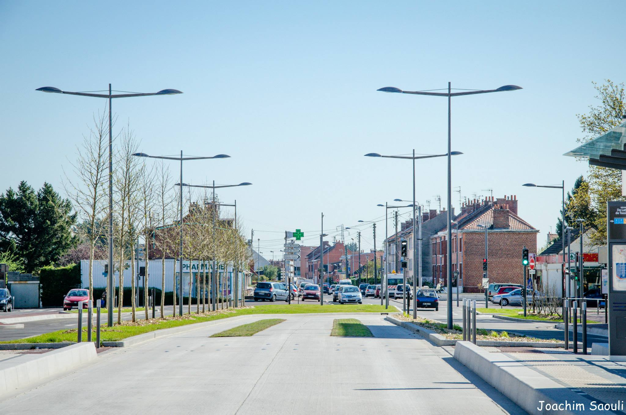 Évéa line A Douai De Lattre de Tassigny extension